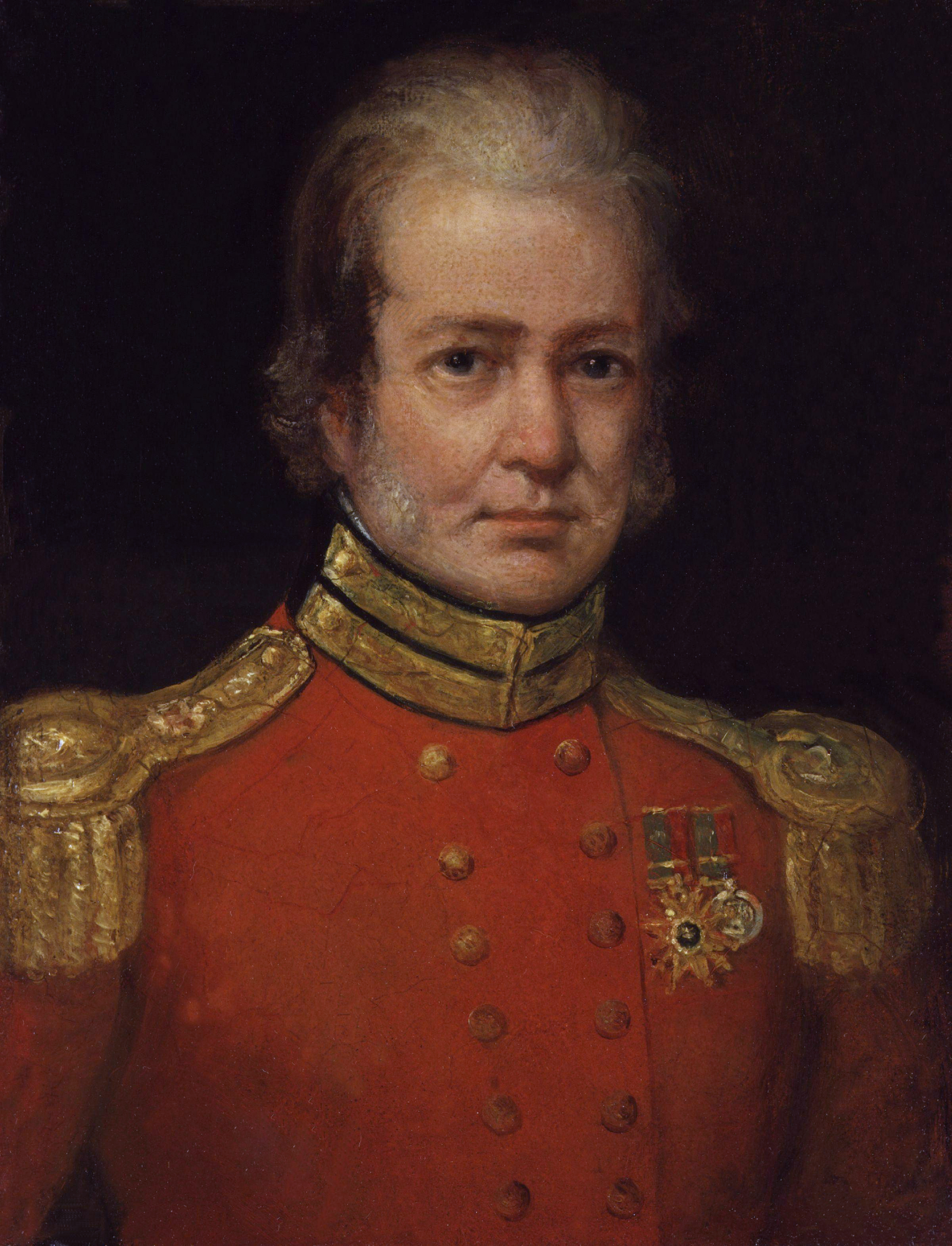 جیمز آتیکنسون، اثر جیمز آتکینسون.